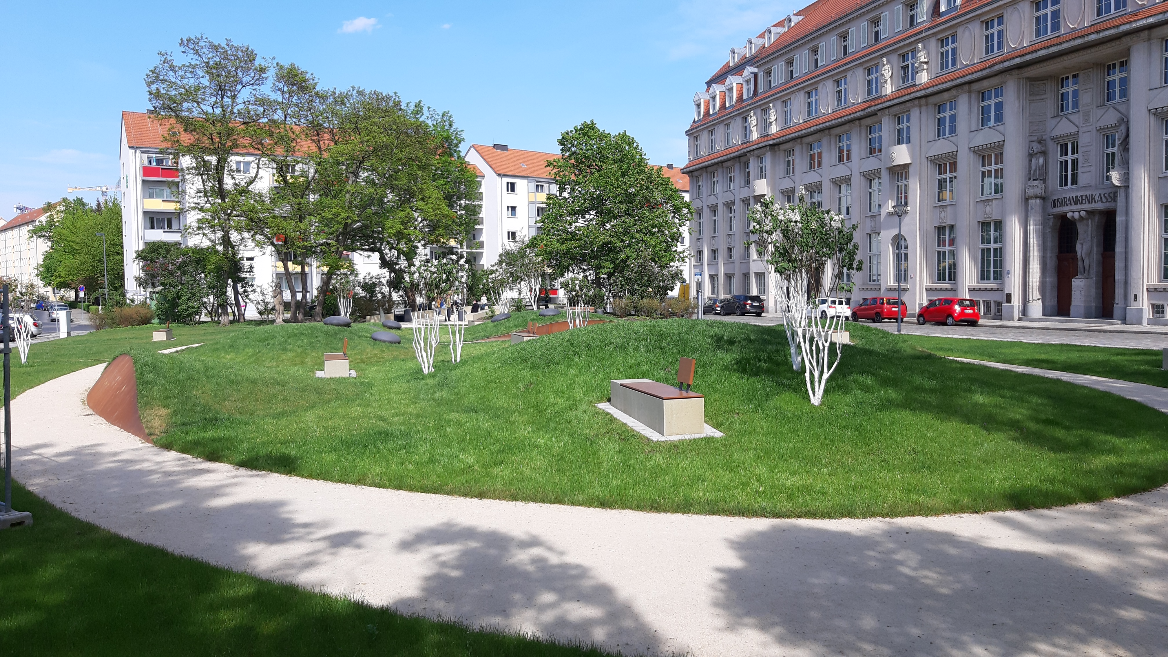 Der Sternplatz in Dresden nach der Neugestaltung 2020